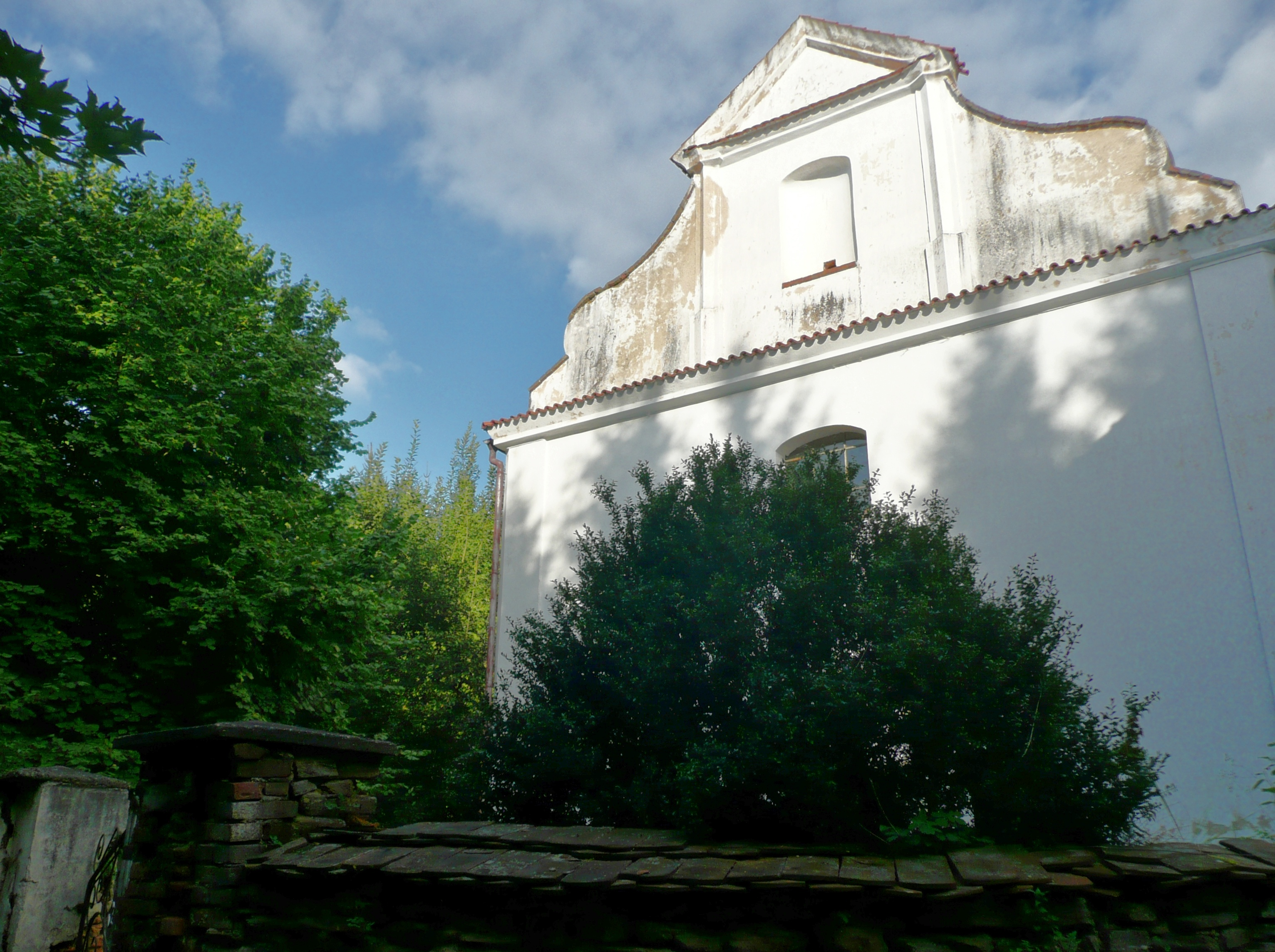 Kostel sv. Petra a Pavla (Borovsko), Borovsko